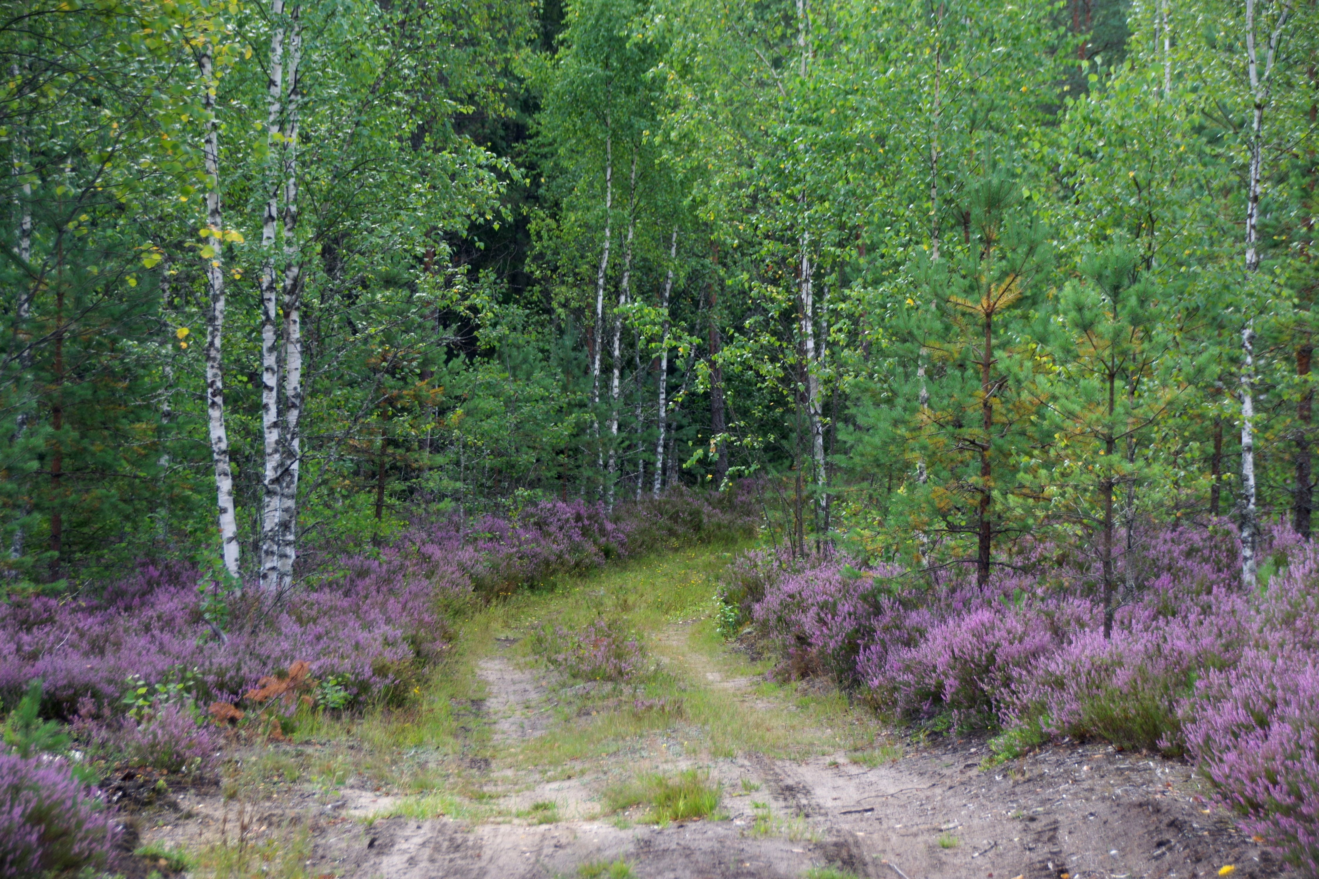 Mustjõe-Aegviidu-Kõrvemaa puhkealal,Mustjõe maastikusõiduala